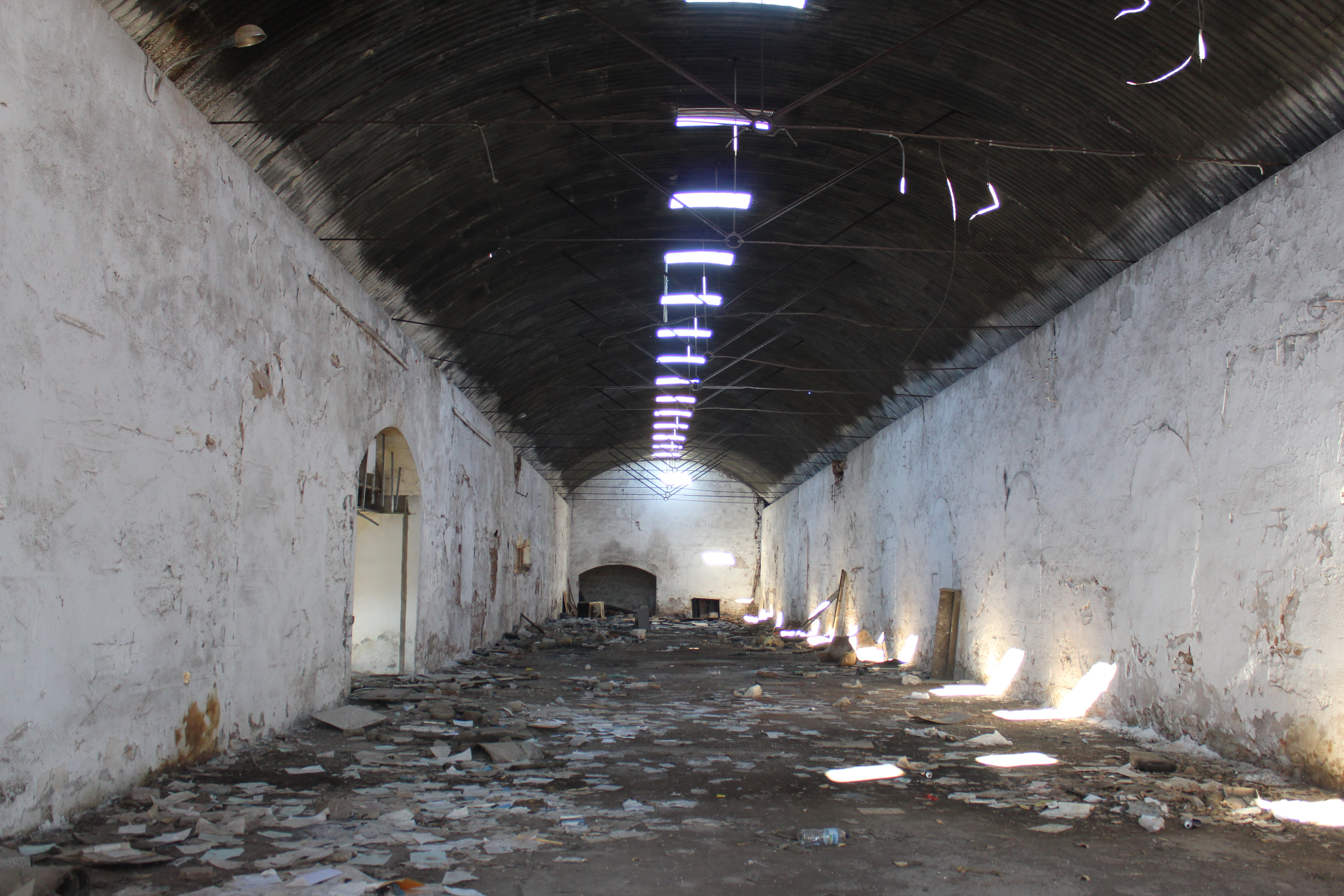 Interior de una nave que estaba destinada a productos de laminación.